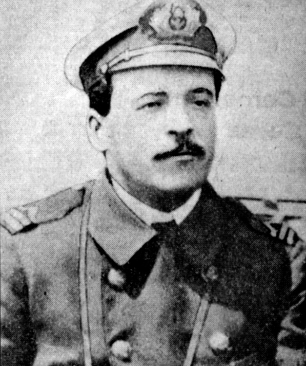 Luis Alberto Pardo Villalón (Santiago, 20 de septiembre de 1882-ibídem, 21 de febrero de 1935) fue un marino chileno, quien estaba al mando del barco escampavía Yelcho de la Armada de Chile, que efectuó el difícil rescate de los náufragos de la célebre expedición científica británica de Ernest Shackleton que llevaban ocho meses en la Isla Elefante (Islas Piloto Pardo, Shetland del Sur), el 30 de agosto de 1916, en pleno invierno antártico.